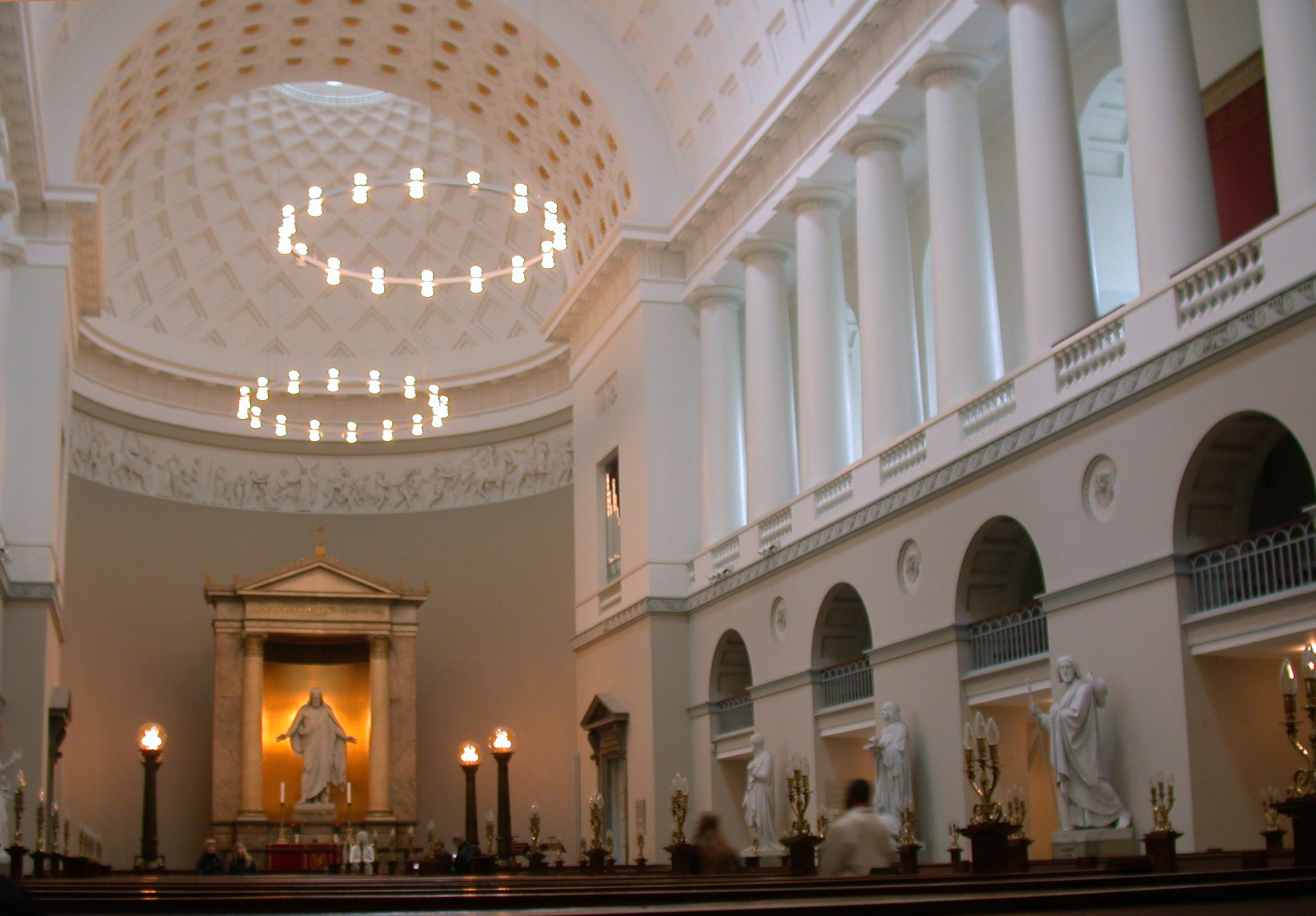 Danimarca, Copenhagen, cattedrale, interno.